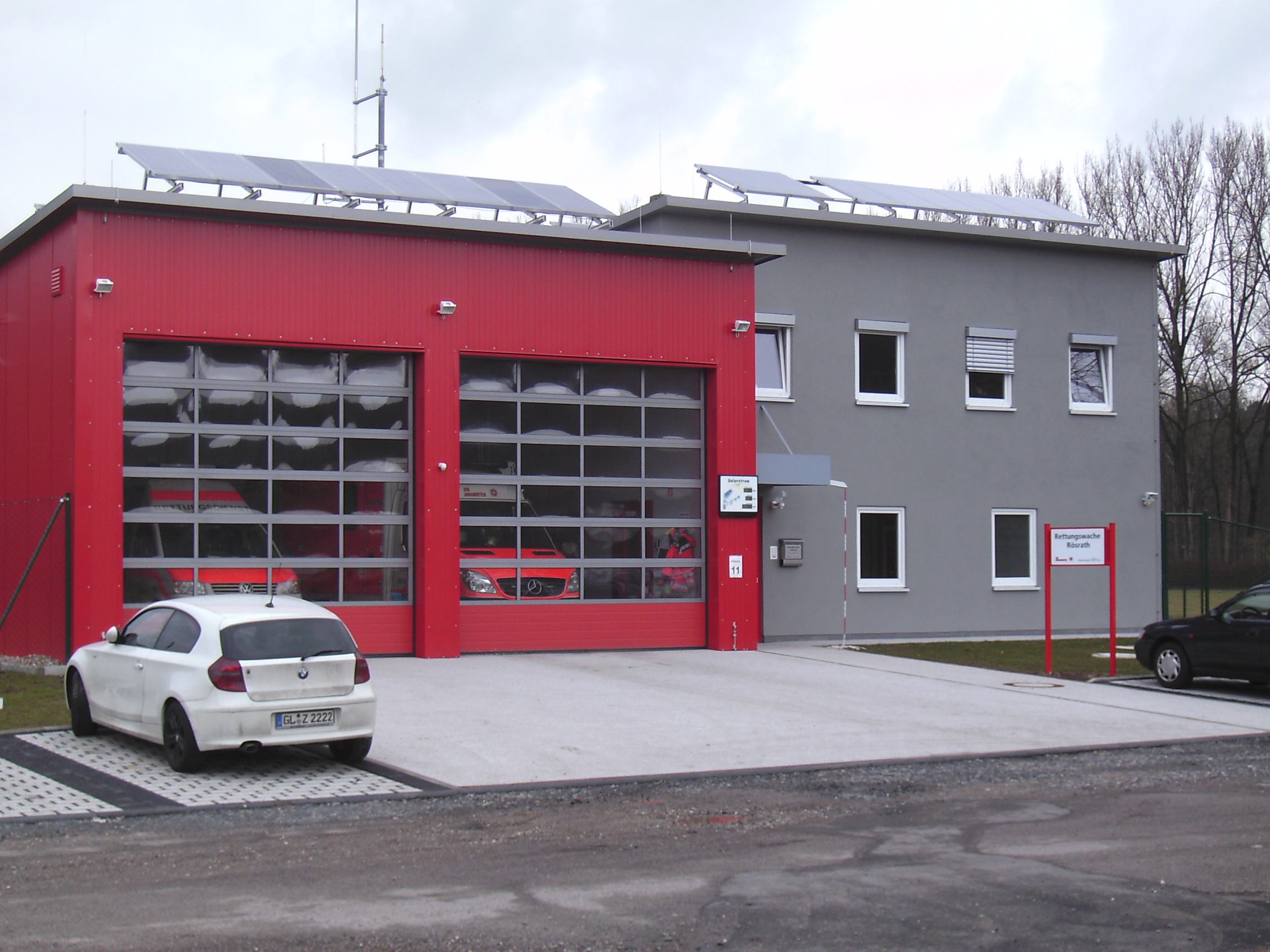 Rettungswache, Venauen 11, 51503 Rösrath, Deutschland.